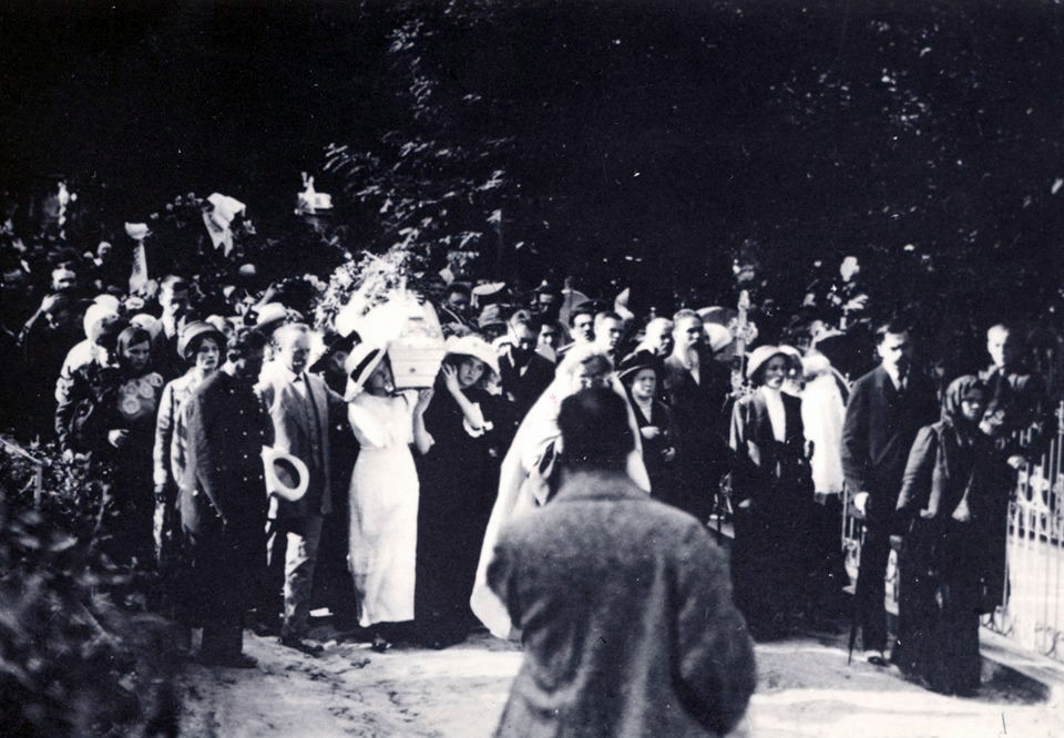 Жалобна процесія з тілом Лесі Українки на Байковому кладовищі - тільки тут труну дозволили нести на руках. Поліція стримувала натовп, намагалася зачинити ворота, але люди прорвалися на цвинтар. До місця поховання пустили тільки родичів і близьких.